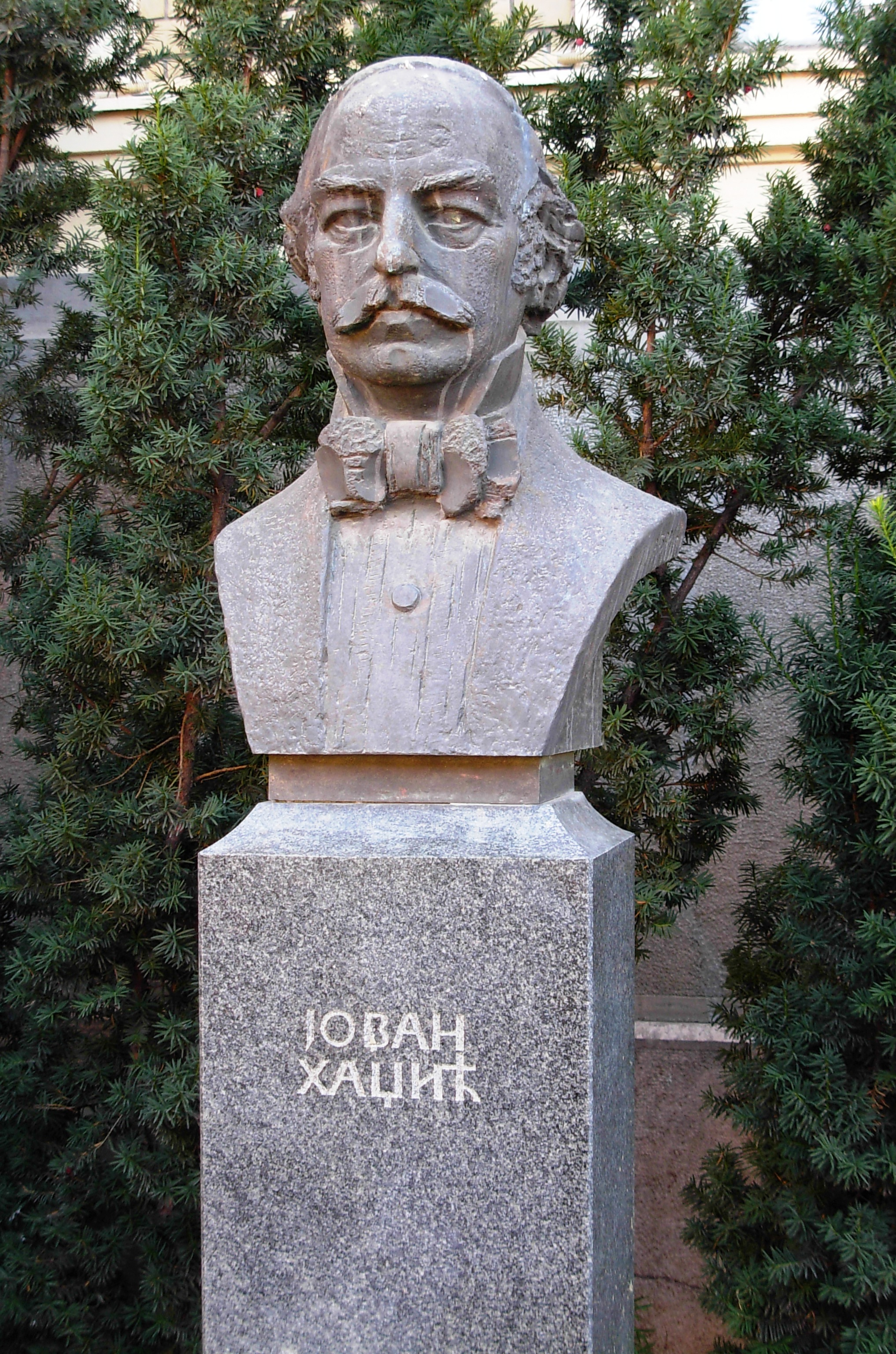 Bista Jovana Hadžića ispred Matice srpske u Novom Sadu.